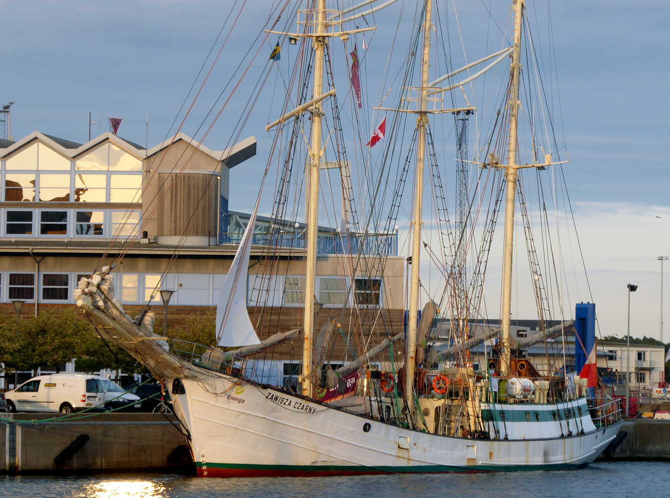 Zawisza Czarny i Ystads hamn 15 aug 2018.